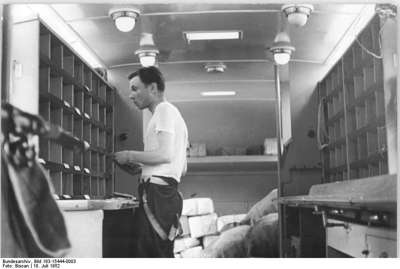 Schnellpost auf der Autobahn Berlin-Magdeburg. Die Postverbindung zwischen den Städten und Dörfern im Magdeburger Gebiet und Berlin verbesserte sich in den letzten Monaten sehr. Die Berliner Zeitungen werden jetzt nicht nur in Magdeburg, sondern auch in den weniger günstig gelegenen Städten und Dörfern der Bürde noch am Tage der Erscheinens zugestellt. Das war möglich durch die Eröffnung eines fahrplanmäßigen Kraftpostverkehrs zwischen Berlin und Magdeburg. Täglich fahren zwei große Postautos, die als rollende Postämter eingerichtet sind und nicht nur Zeitungen, sondern auch Briefpost, Eilsendungen und Pakete befördern. Während der Fahrt werden die Sendungen sortiert und bearbeitet, sodaß sie am Bestimmungsort sofort weitergegeben werden können. UBz: Blick in den Postwagen. Der Wagen ist sogar mit einem Duschraum ausgestattet, in dem sich die Angestellte erfrischen können. Zentralbild-Biscan 10.7.52